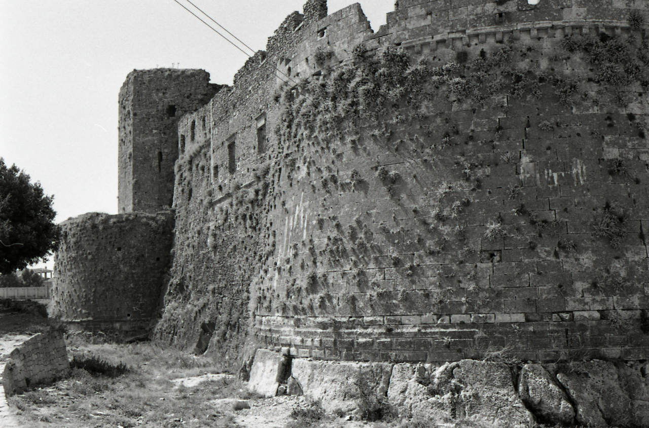 Servizio fotografico : Monte Sant'Angelo, 1970 / Paolo Monti. - Strisce: 7, Fotogrammi complessivi: 38 : Negativo b/n, gelatina bromuro d'argento/ pellicola ; 35 mm. - ((I fotogrammi hanno una doppia numerazione. . - Sul portanegativi: Nikmat FP4. - Sul dorso del portanegativi Monti specifica: "Castello". - Occasione: Documentazione per la pubblicazione di: Calò Mariani Maria Stella, "L'arte del duecento in Puglia", Torino, Istituto Bancario San Paolo, 1984. - Fonte: Agenda di Paolo Monti: Monti - Agenda 1970 (1970), presso Archivio Paolo Monti